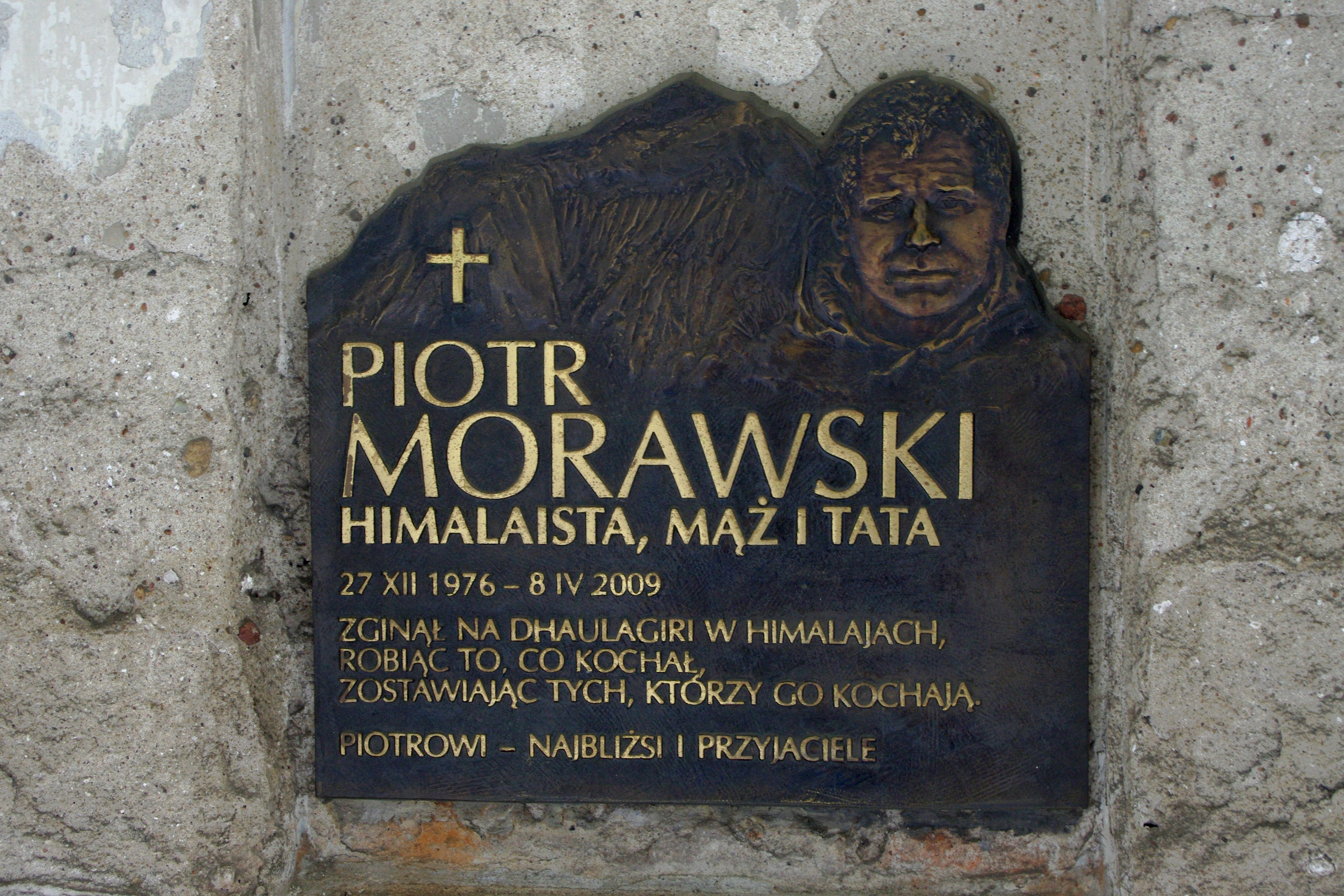 Tablica upamiętniająca himalaistę Piotra Morawskiego w Kościele św. Antoniego Padewskiego na warszawskim Śródmieściu